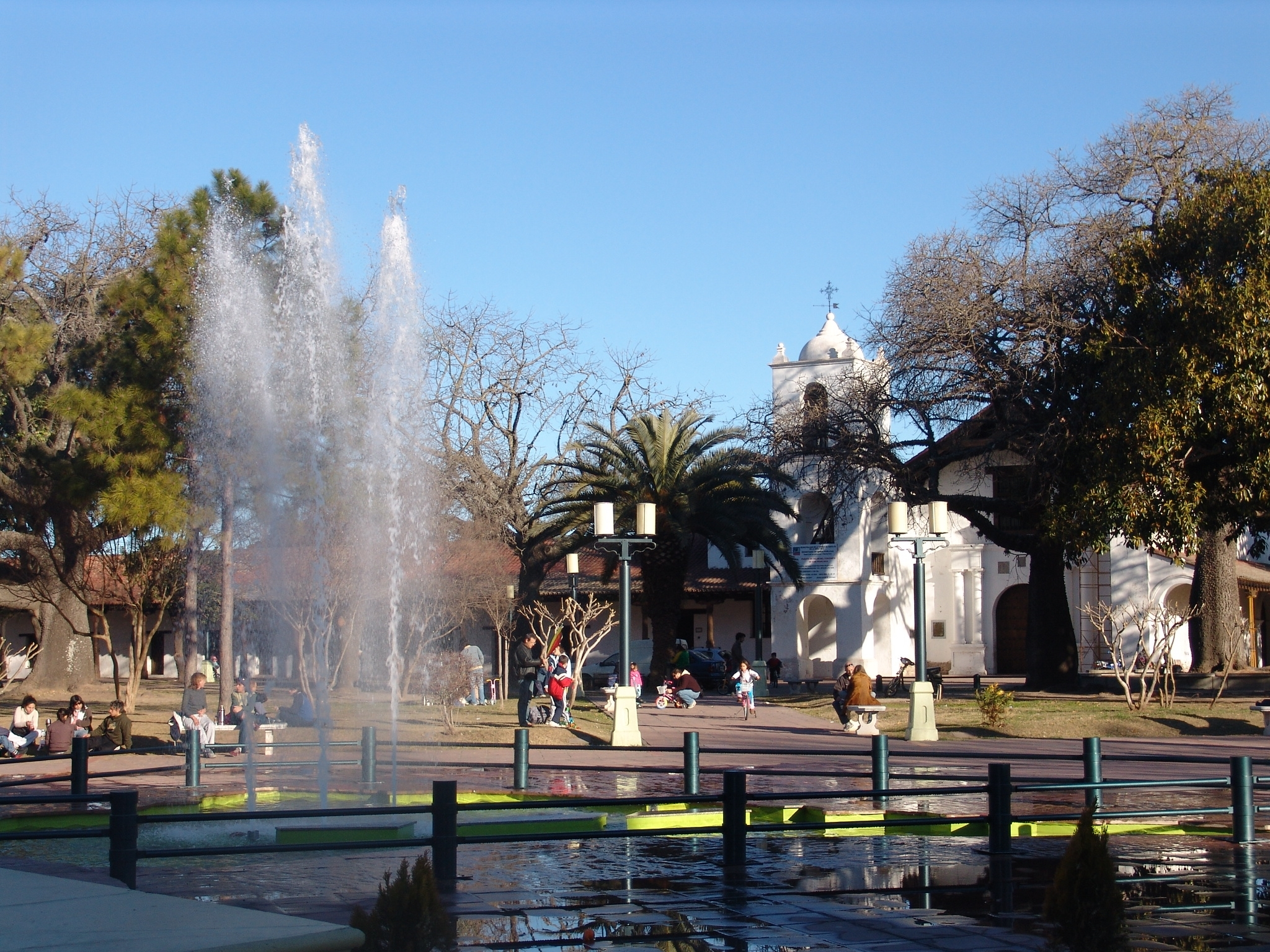 Paseo de las Tres Culuras, Santa Fe, Argentina